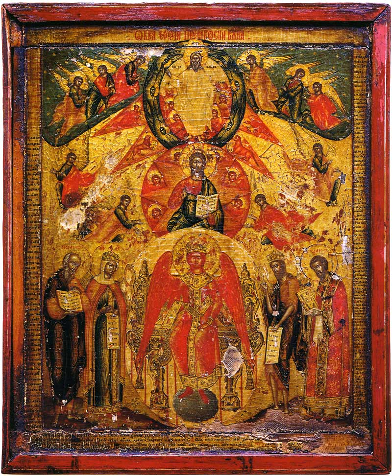 София Премудрость Божия Створка складня Школа или худ. центр: Невьянск (круг Богатыревых) Последняя четверть XVIII в. Дерево, ковчег. Паволока, левкас, темпера, золочение. 33.2 × 27 × 1.5 см Частное собрание, Екатеринбург, Россия